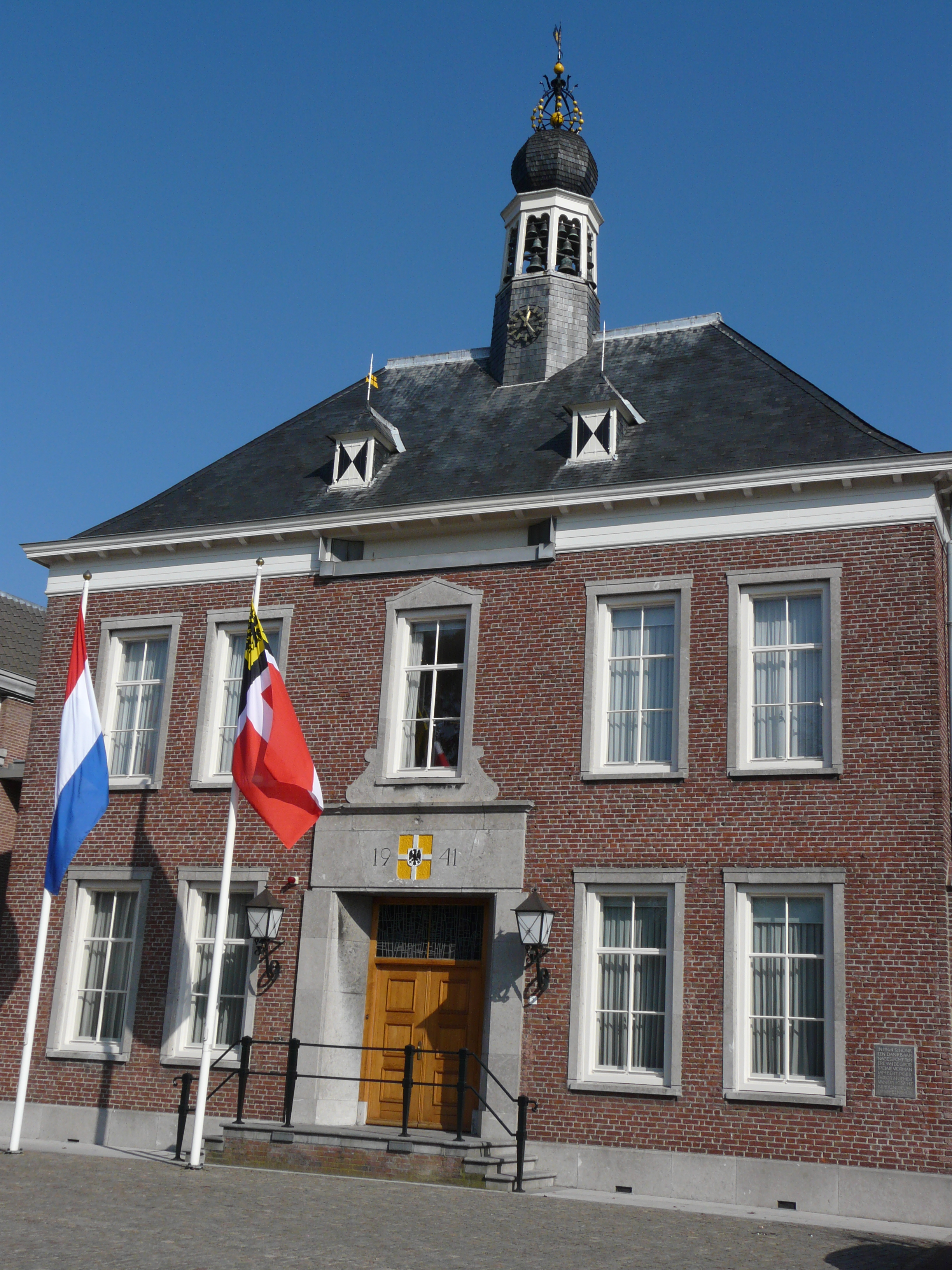 Raadhuis Gemert 99